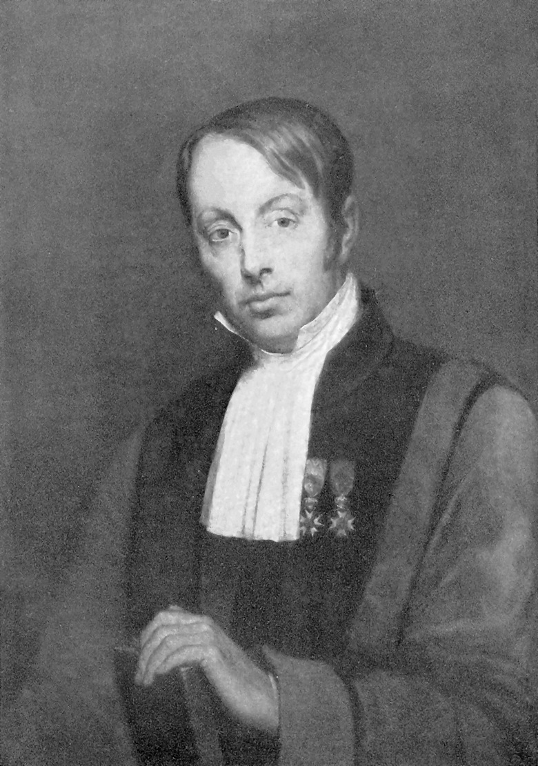 Portrait de Jean-Nicolas Marjolin (1780-1850)